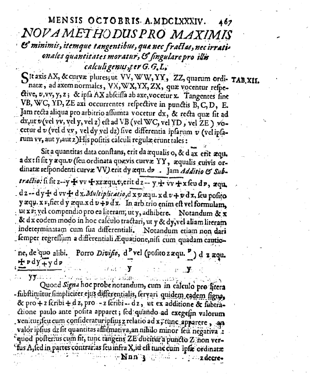 Acta eruditorum 1984 Nova Methodus, von Leibniz, erste Seite mit Inhalt